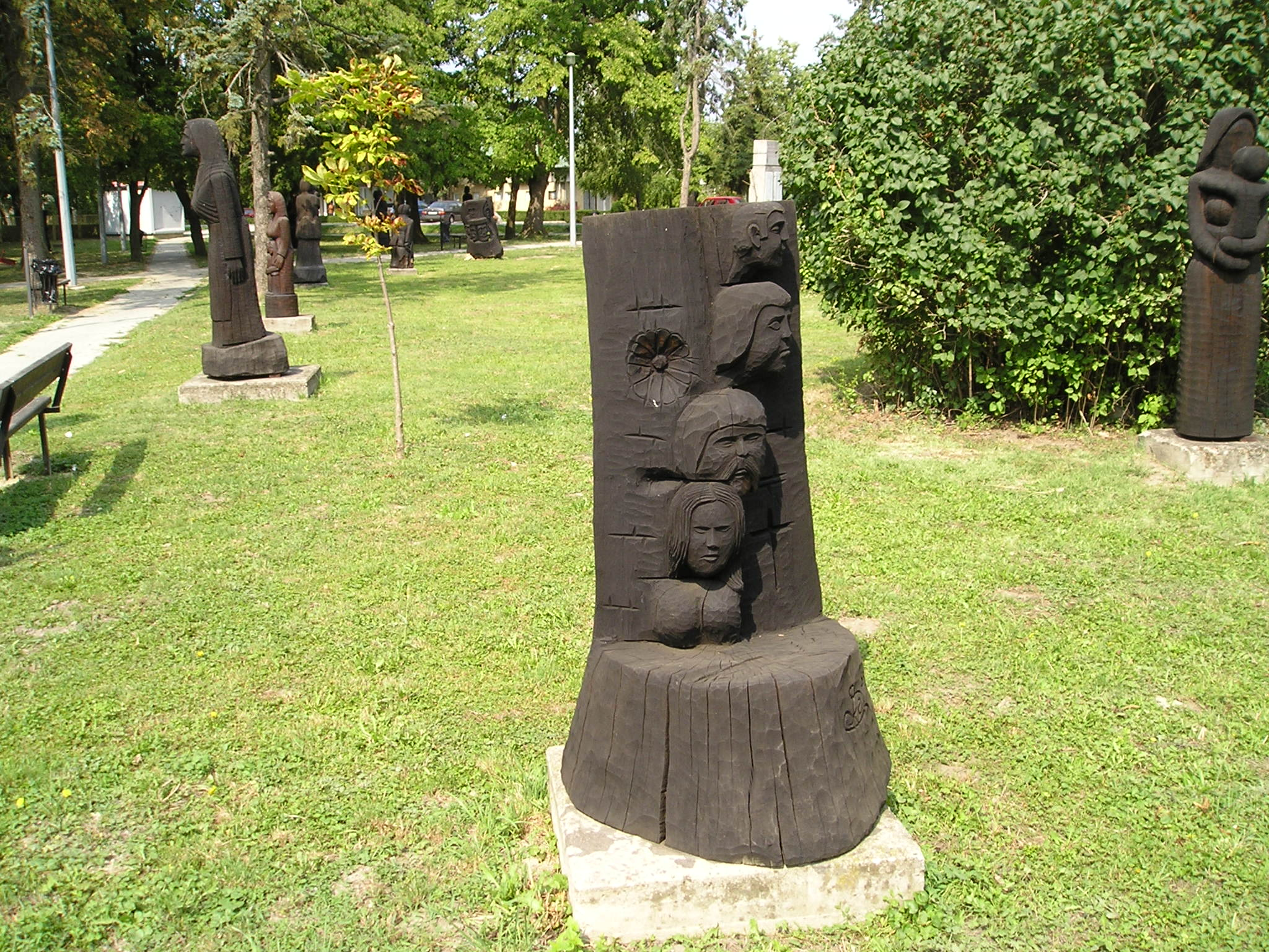 Naive art in Ernestinovo (near Osijek), Croatia